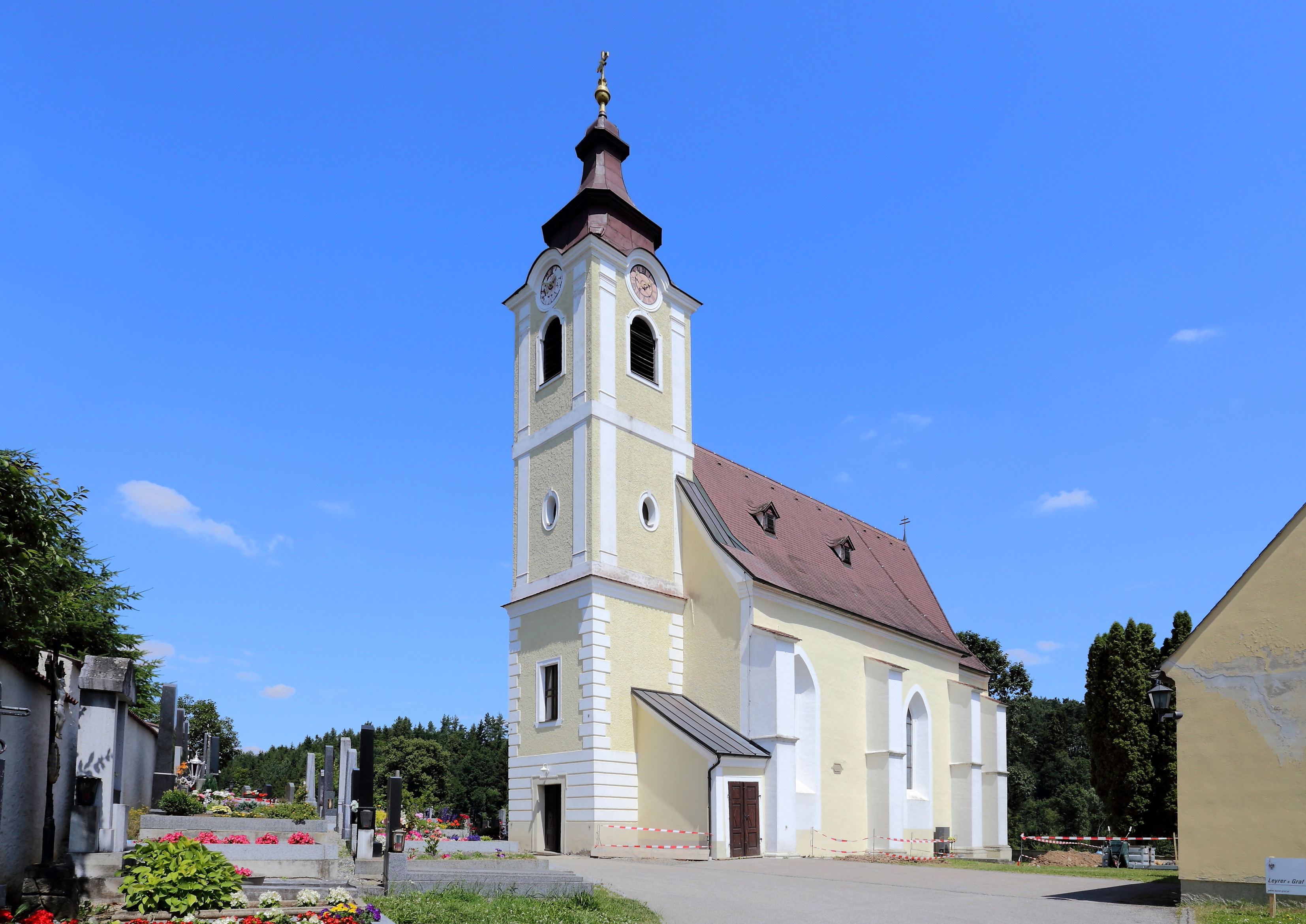 Die röm.-kath. Pfarrkirche hl. Jakobus in Aigen, ein Ortsteil der niederösterreichischen Marktgemeinde Ludweis-Aigen. Eine im Kern gotische und später vollständig im Stil der Spätrenaissance umgestaltete Saalkirche mit einem um 1770/80 erbauten, spätbarocken, viergeschossigen Westturm.